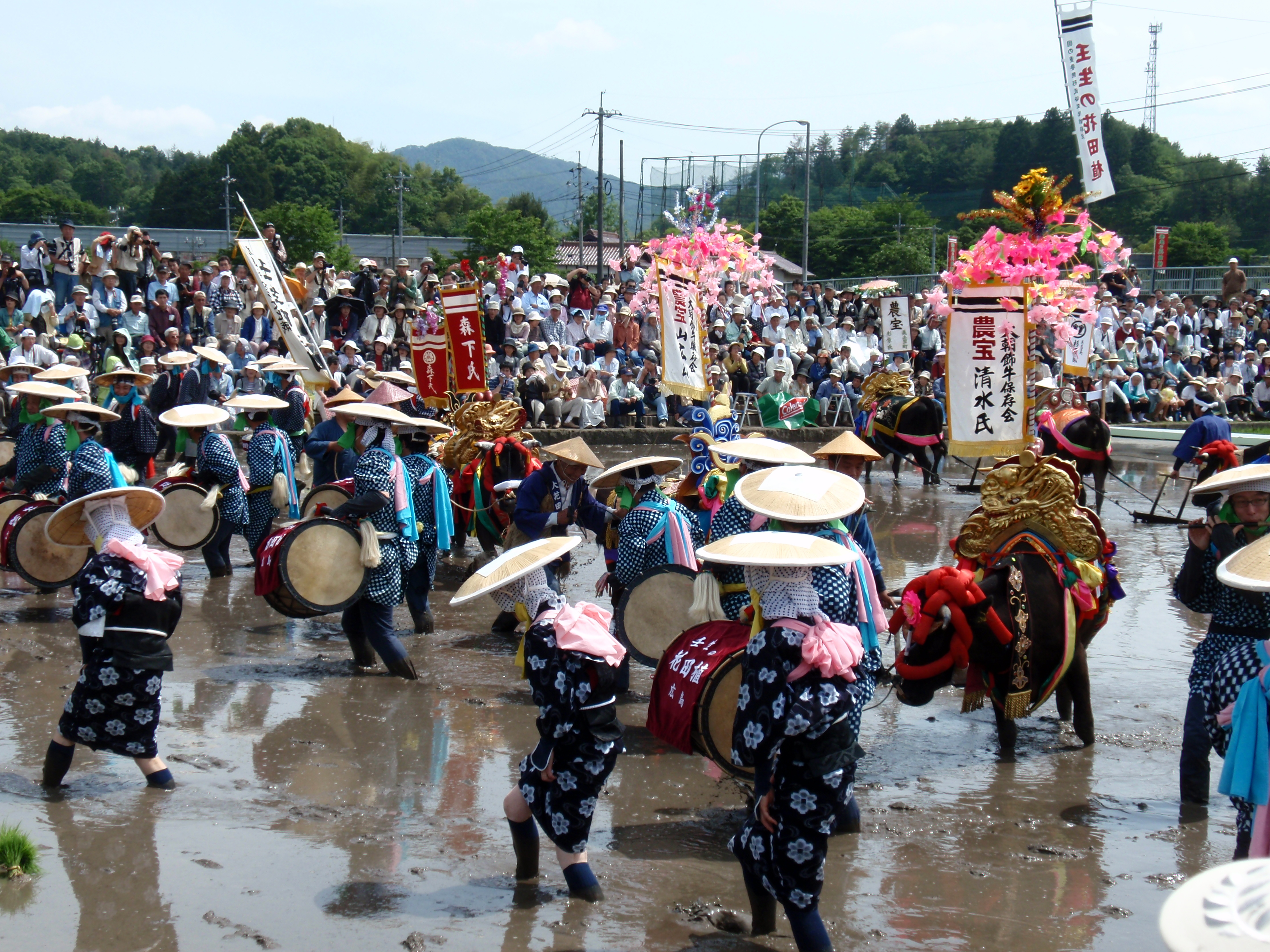 広島県北広島町で開催される壬生花田植